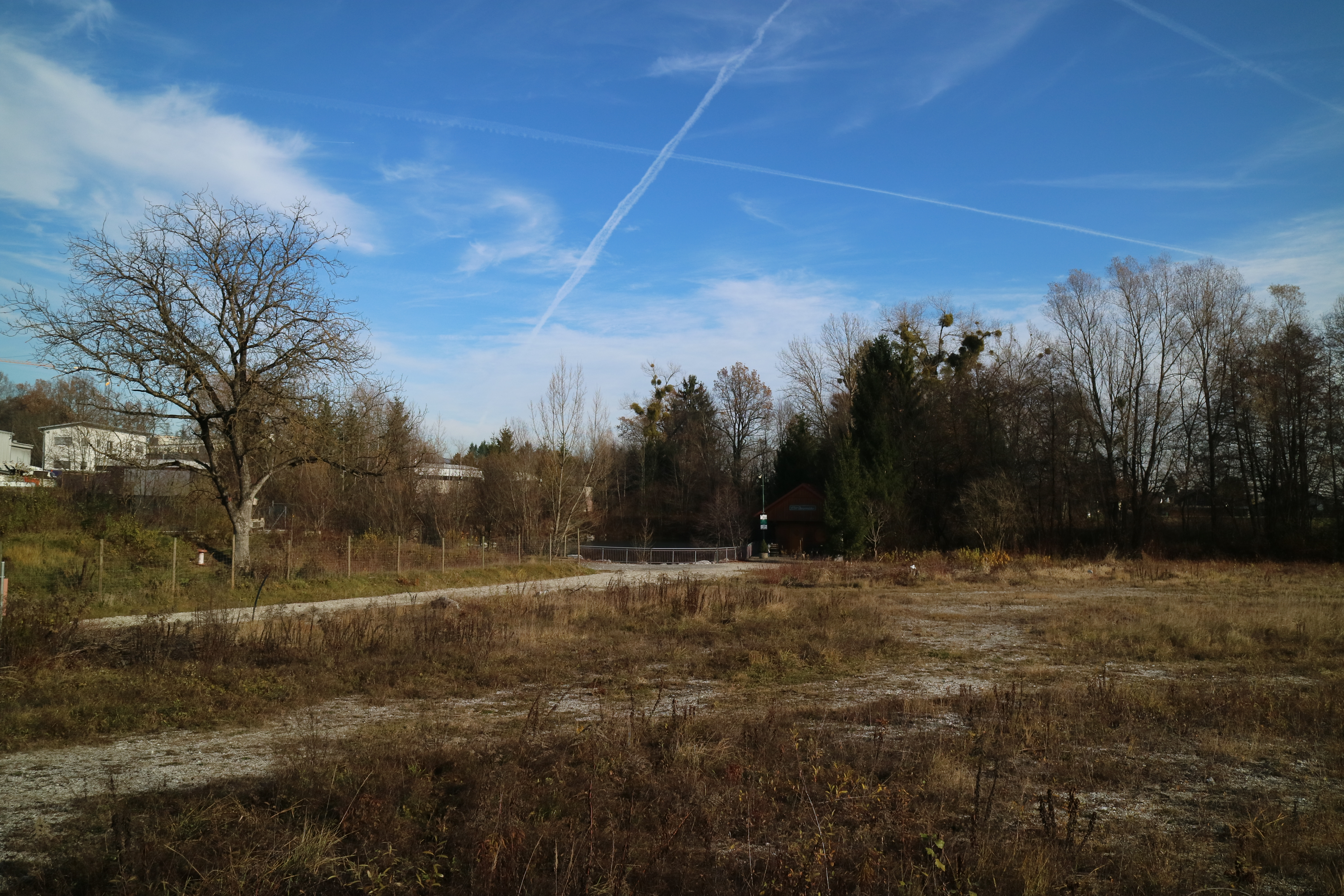 Brachfläche in Oberpremstätten (Gemeinde Premstätten), Steiermark